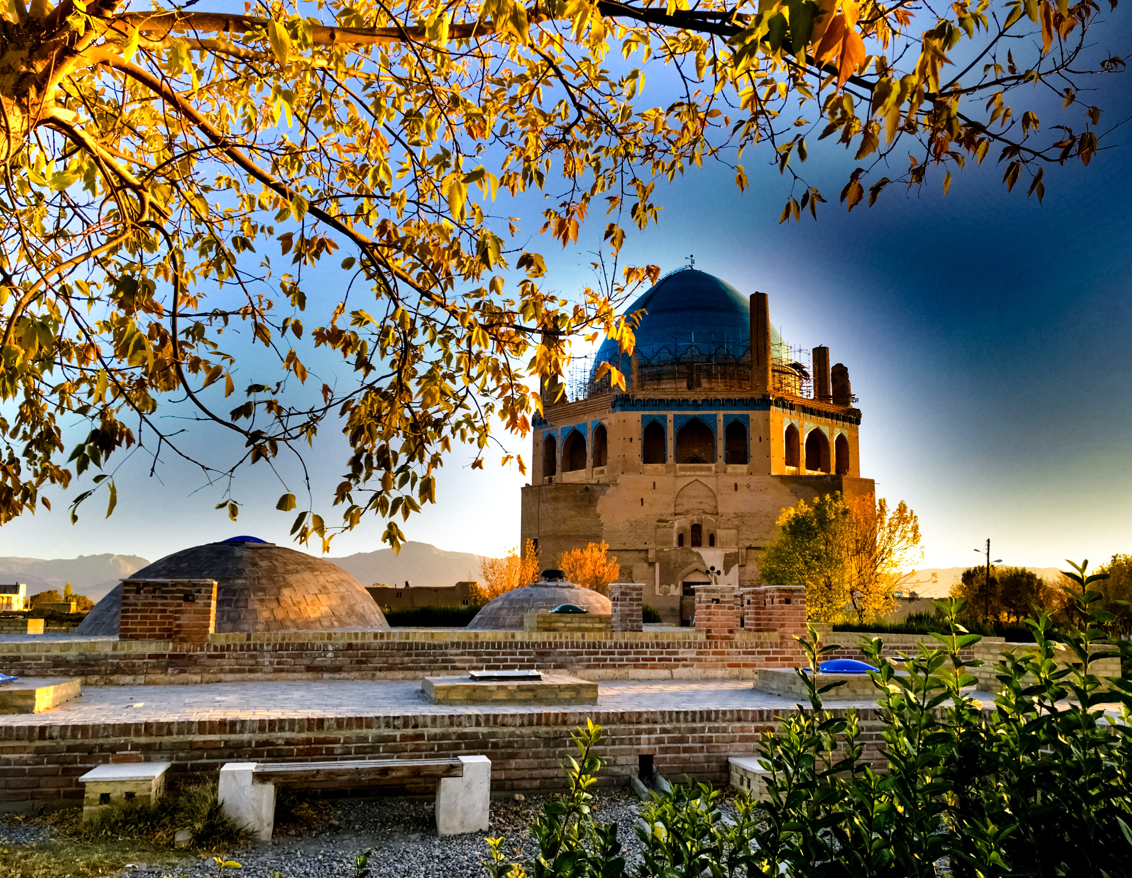 مقبره سلطان محمد خدابنده الجایتو، بزرگترين گنبد آجري جهان